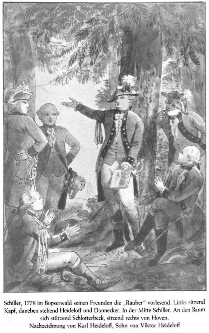 Siehe Bildunterschrift.